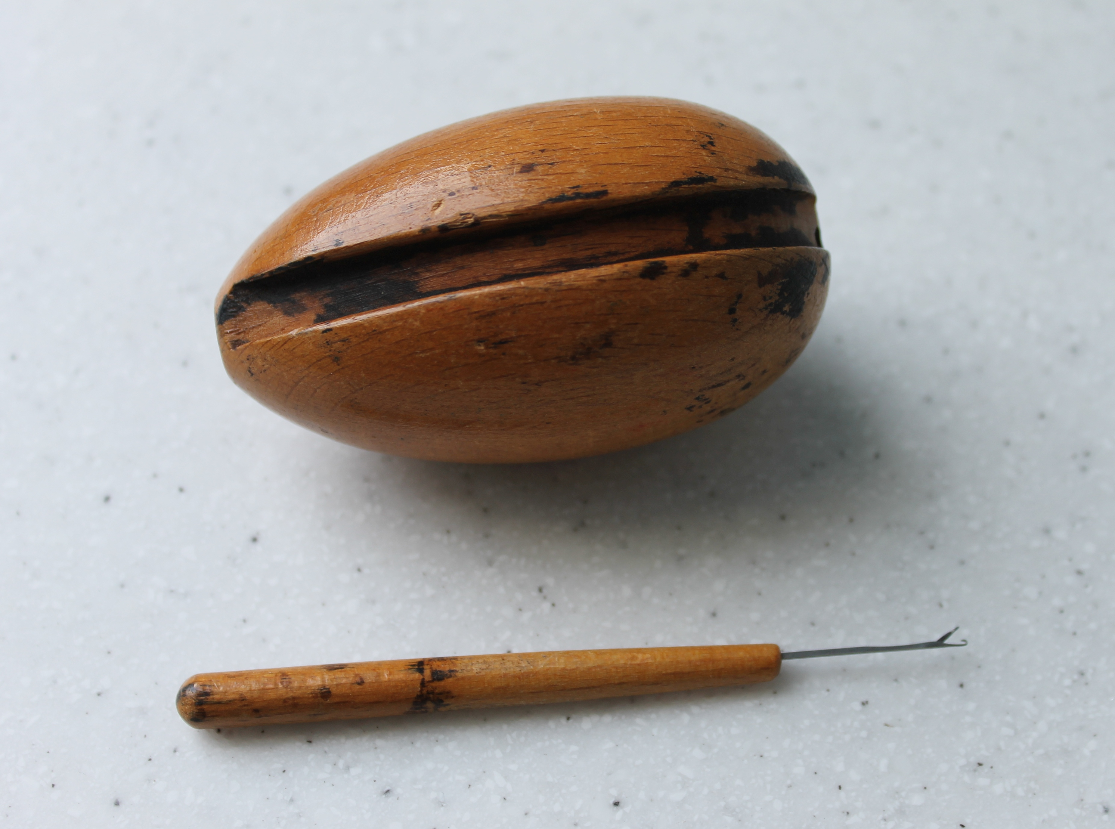 Imra Laufmaschen-Stopfei, Pat. 989116, 1950er Jahre